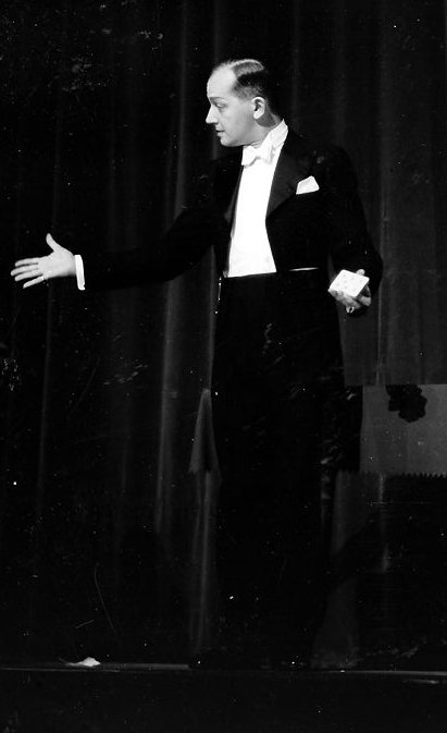 Kabarett der Komiker: Valentino Graziadei zeigt Spielkarte